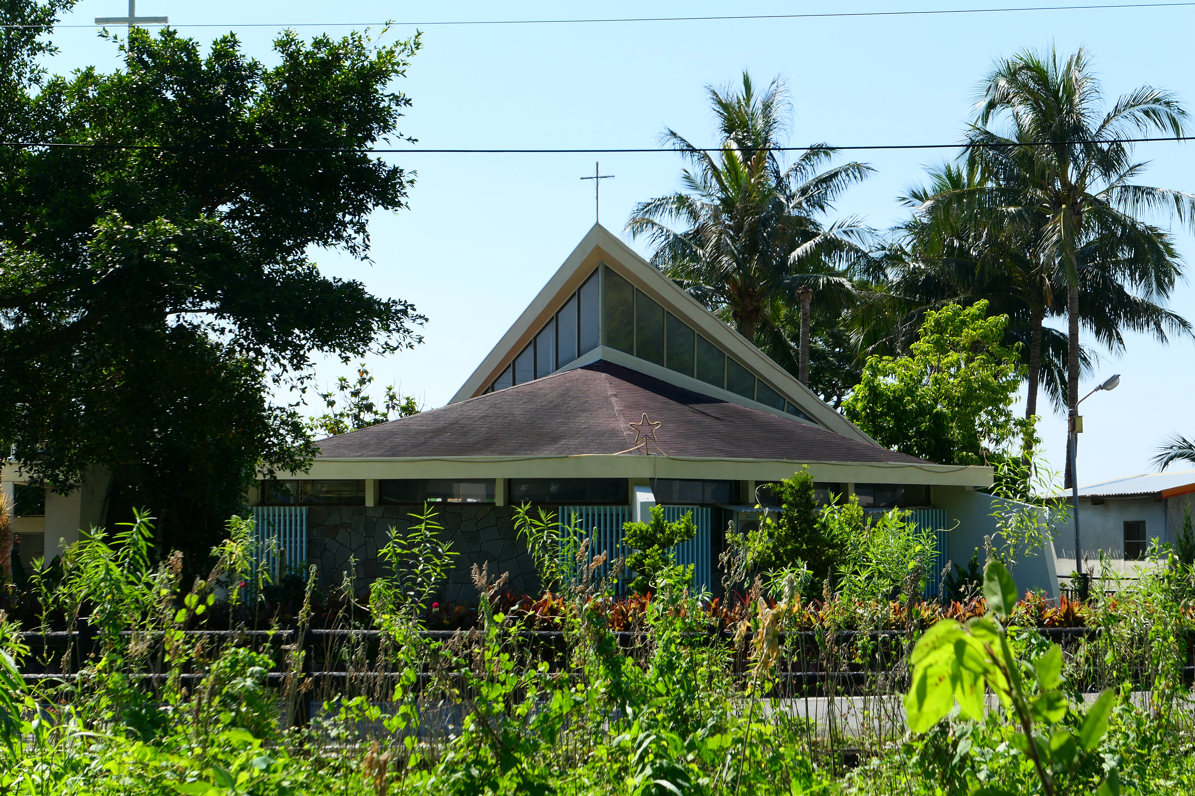 在臺11線上拍的小馬天主堂